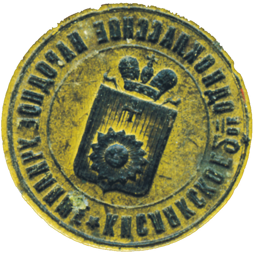 Печать Кислякского 2-го одноклассного народного училища